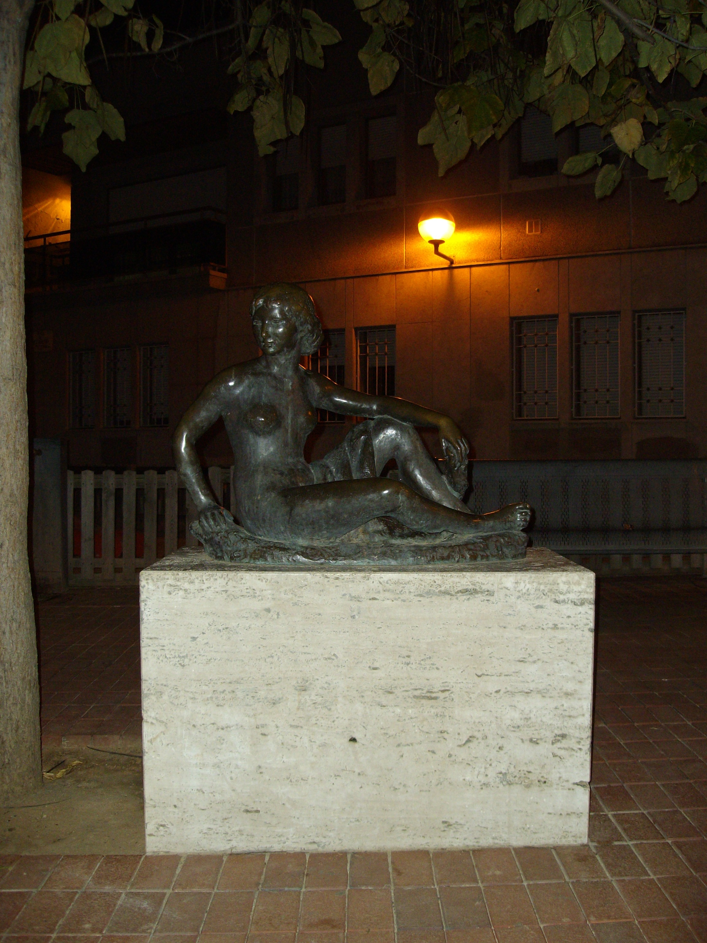 Dona asseguda (Mujer sentada), escultura realizada en 1942 por Enric Casanovas y erigida en el centenario del nacimiento del pintor sabadellense Antoni Vila Arrufat en 1994, en la plaza que lleva su nombre, en Sabadell, Barcelona (España).